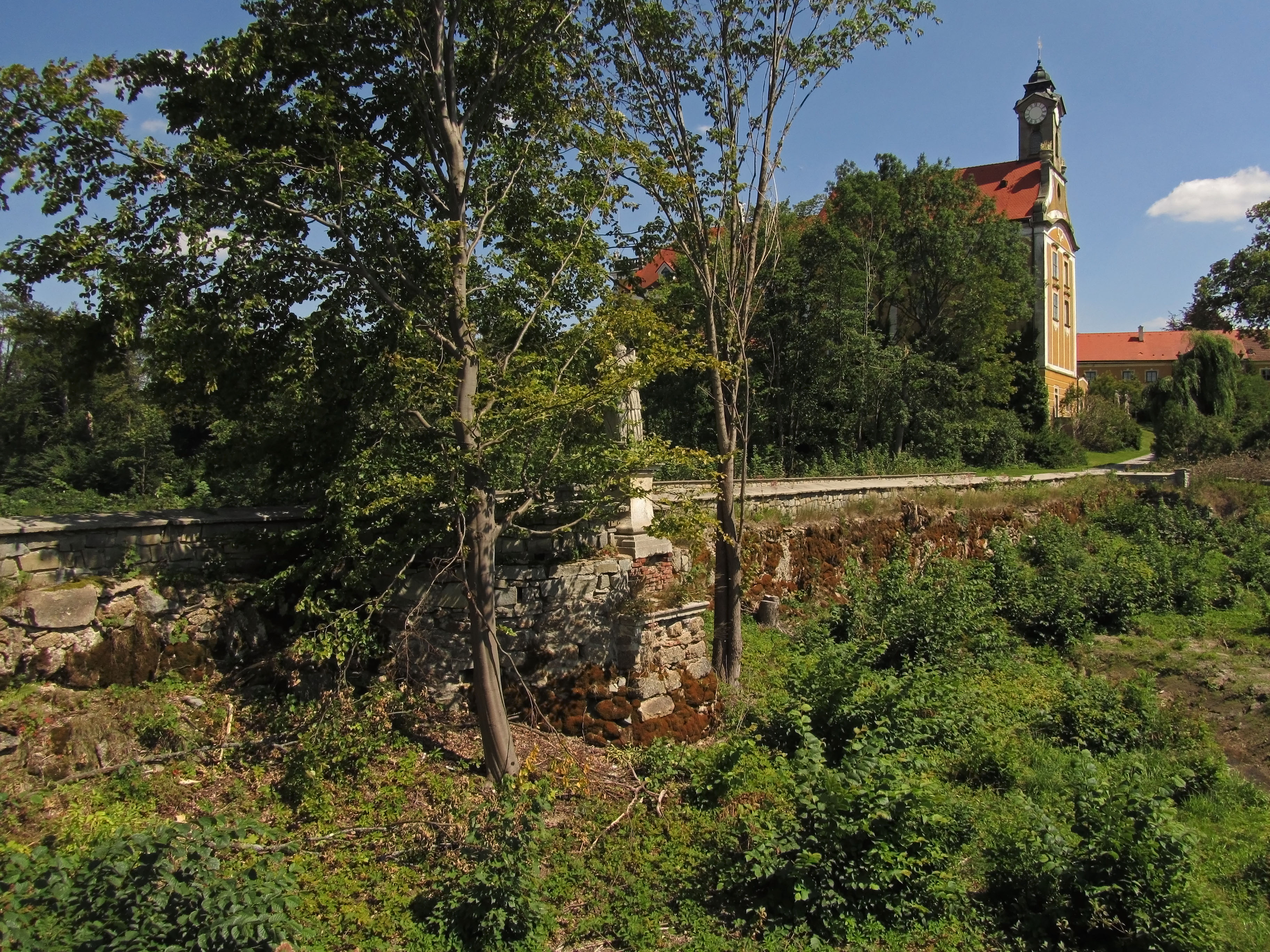 Straßenbrücke zum Schloss Kirchberg am Walde